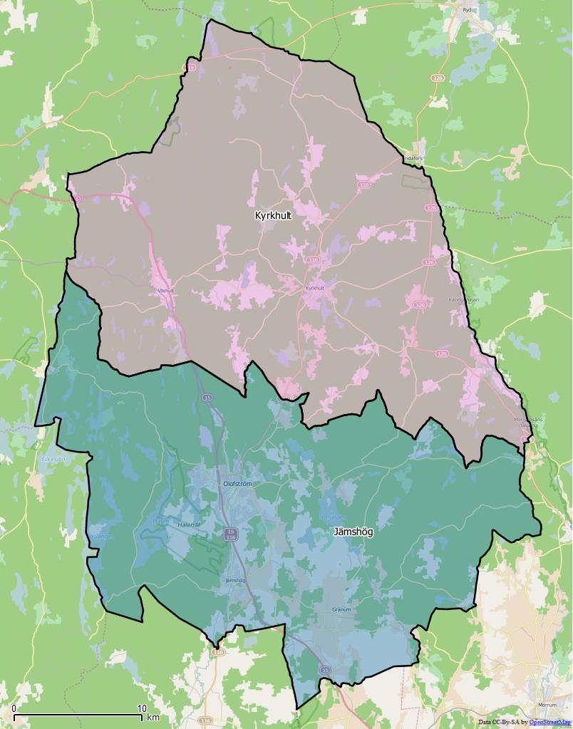 Distriktsindelningen i Olofströms kommun World file: 55.84318509649481399 0 0 -55.84318509649481399 1599217.07524978904984891 7652016.21258233860135078